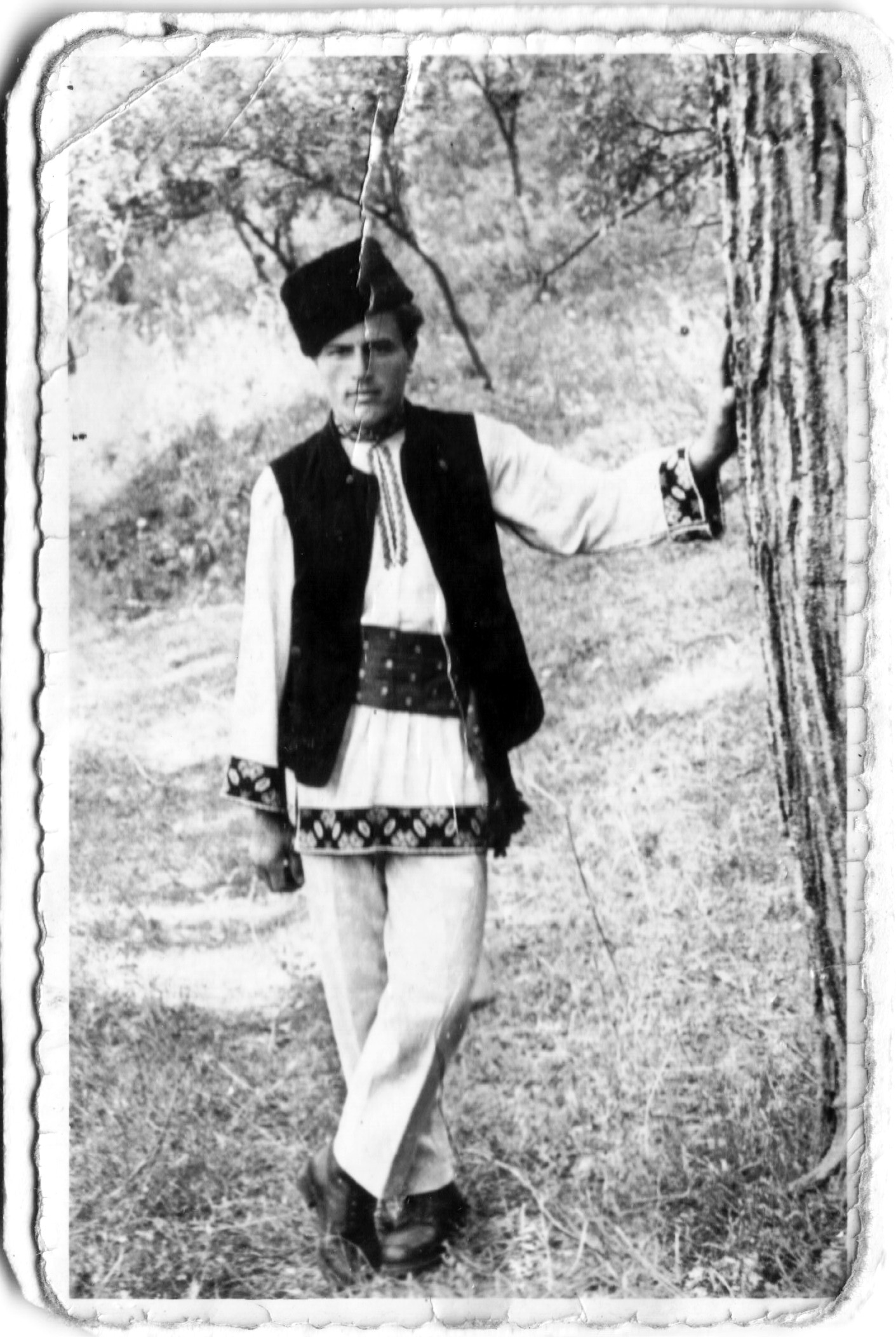 Port popular din localitatea Fieni. Caliţeanu Stelian.